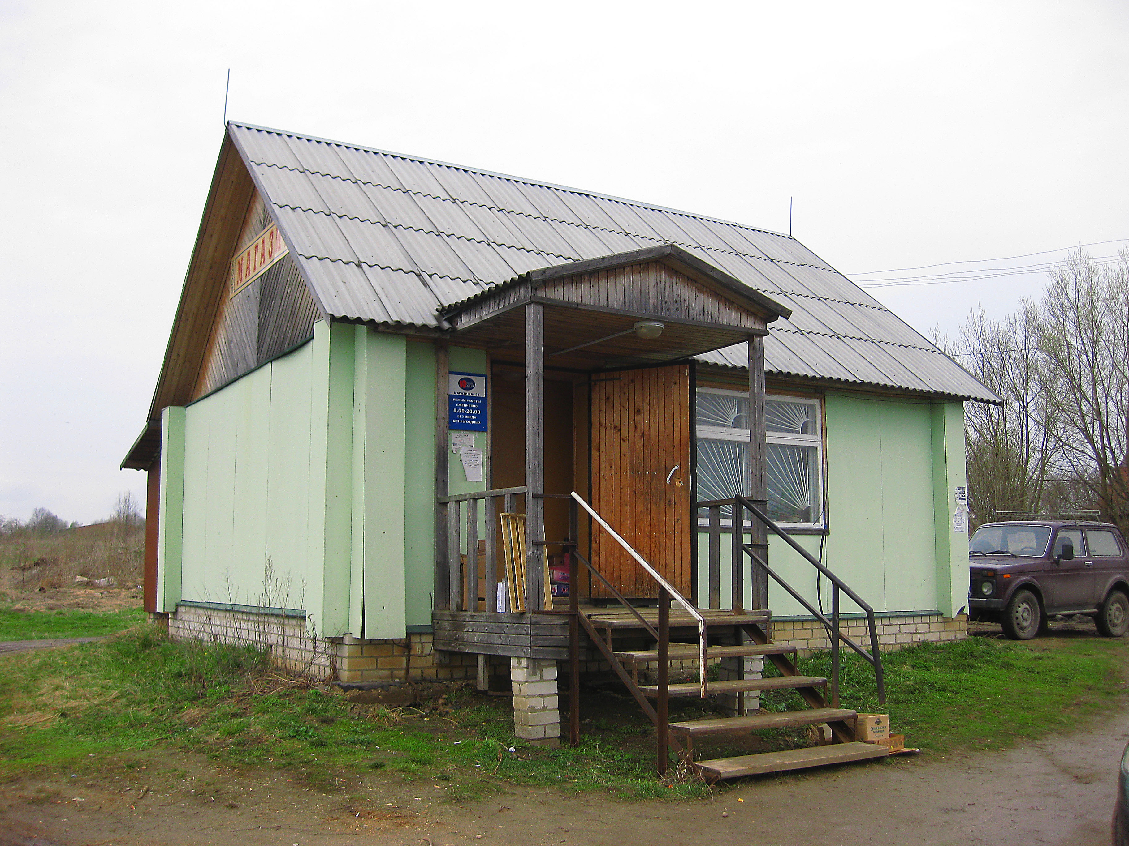 Сельский магазин в деревне Лазарево Ростовского района